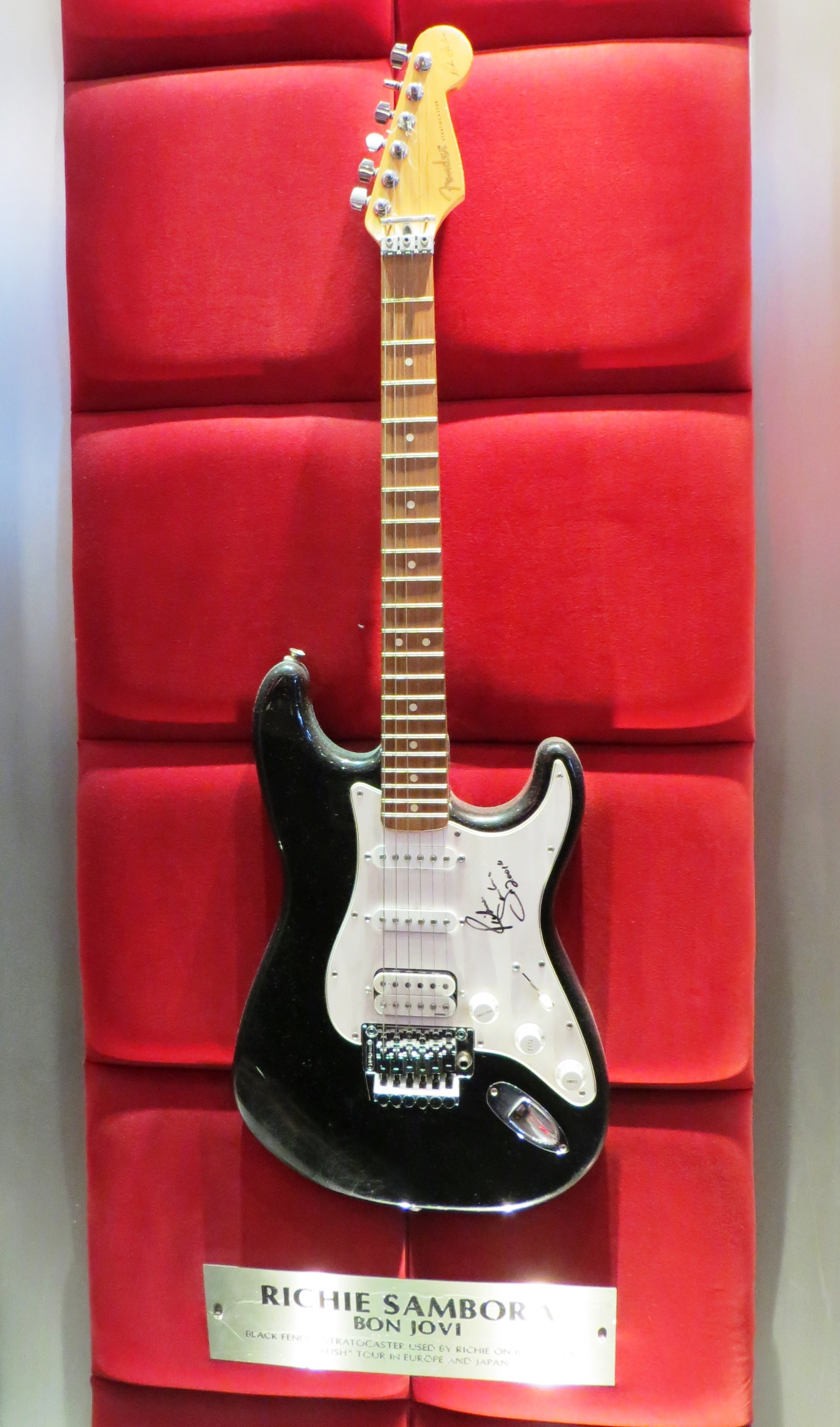 Hard Rock Café Londen